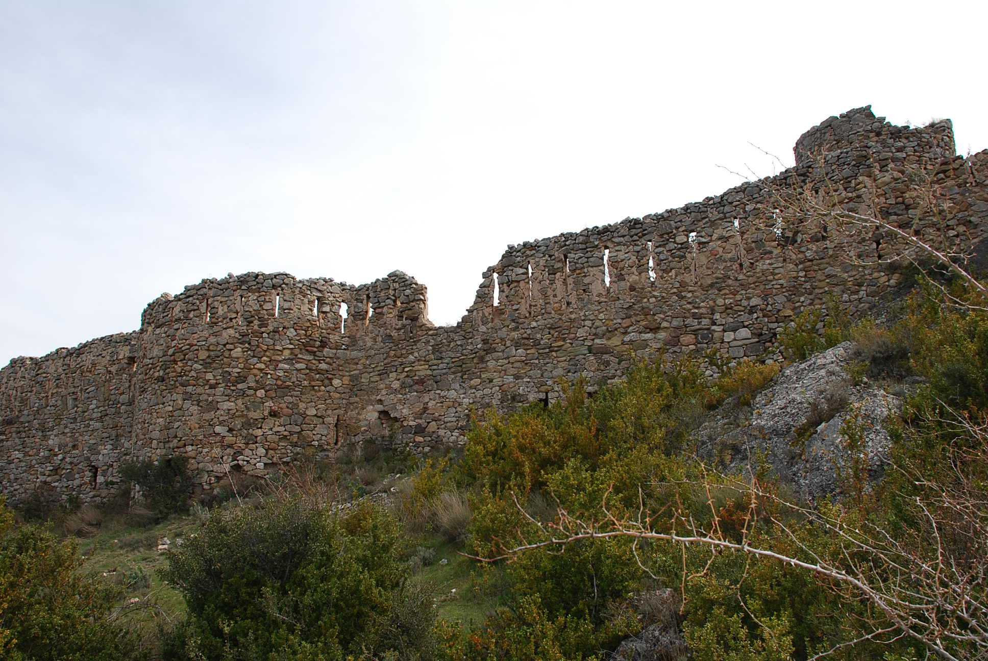 Castillo de Jubera en La Rioja, España.